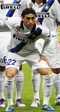 FC Internazionale 2011-2012